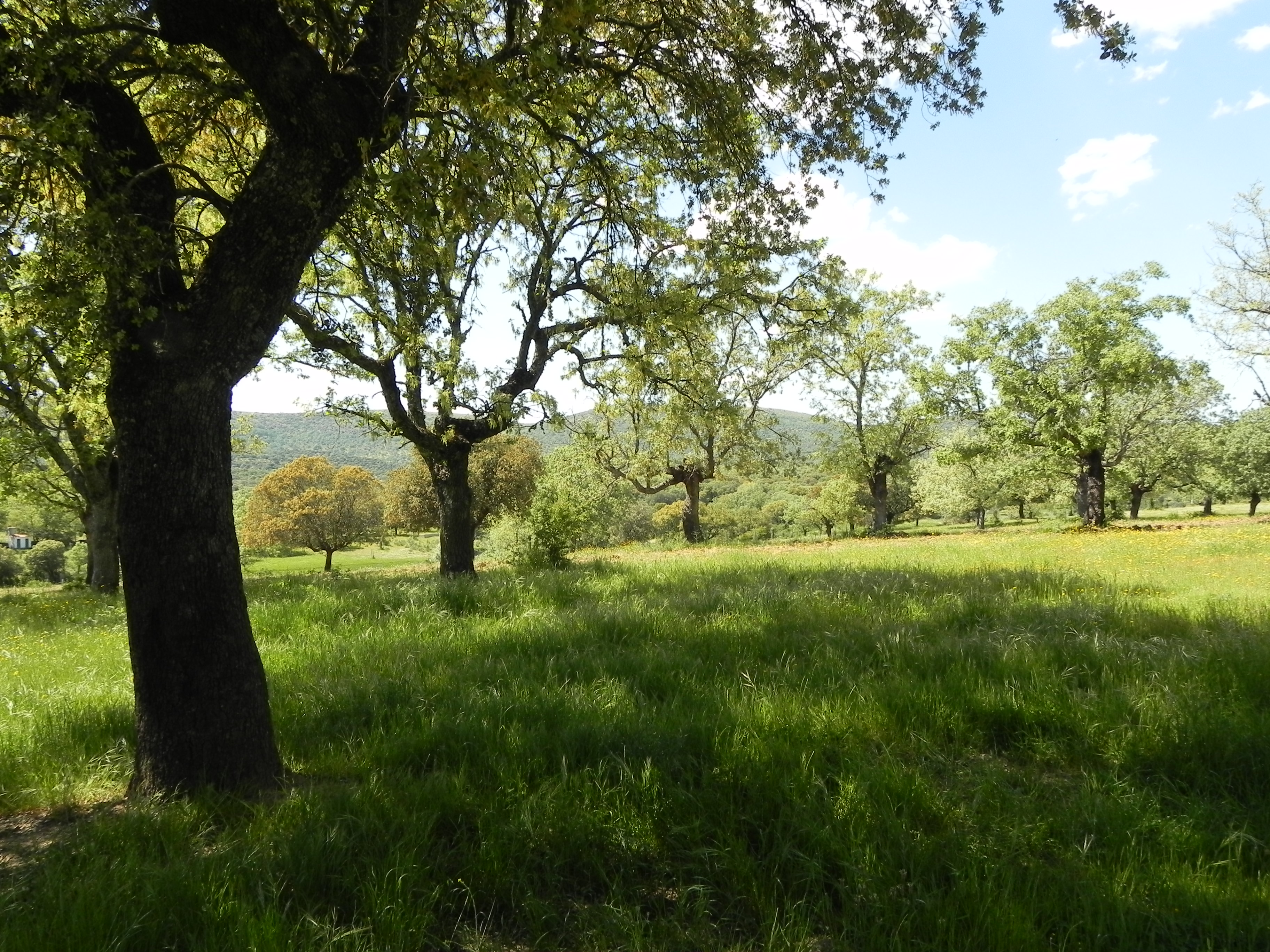 Dehesa boyal de robles de la localidad cacereña de Garciaz.